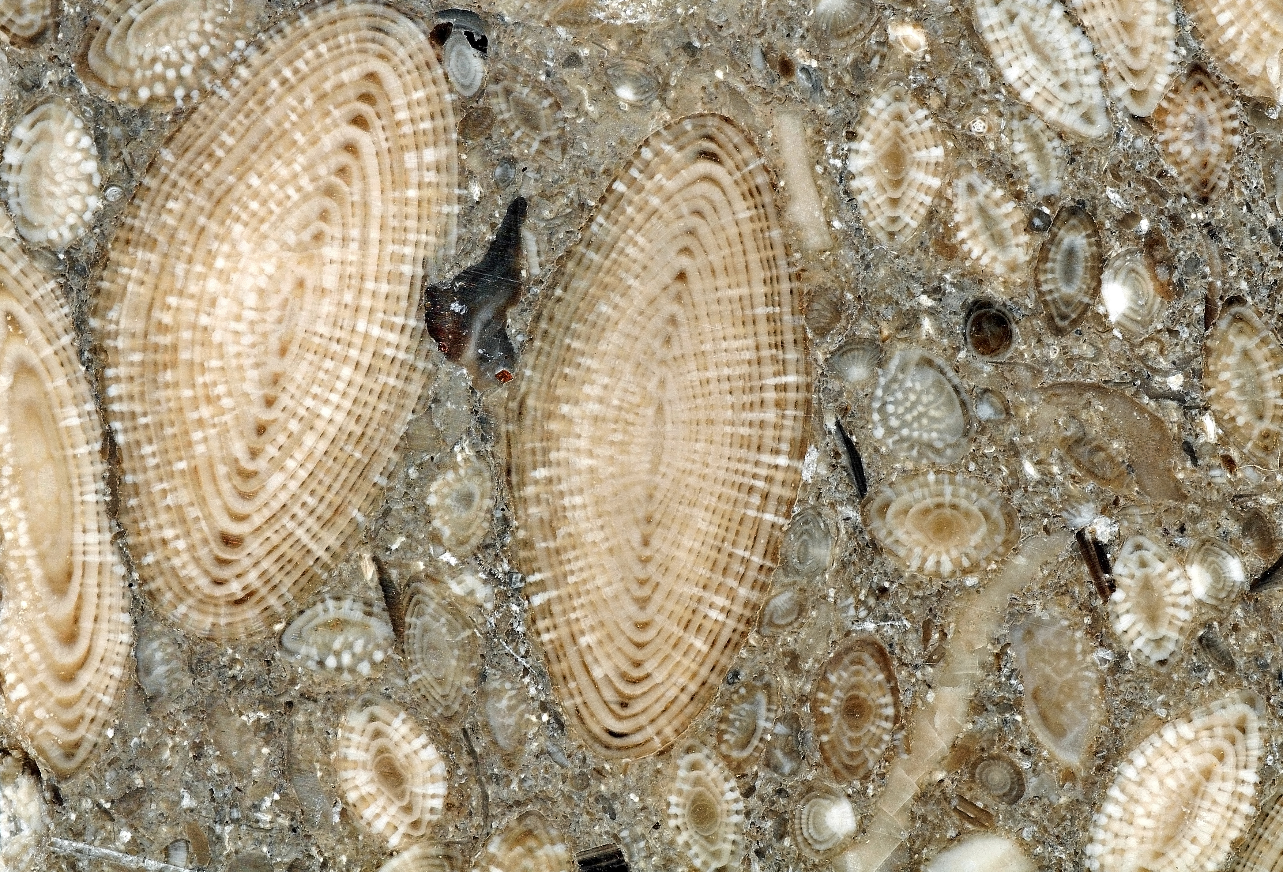 nummulites : France - 15 mm